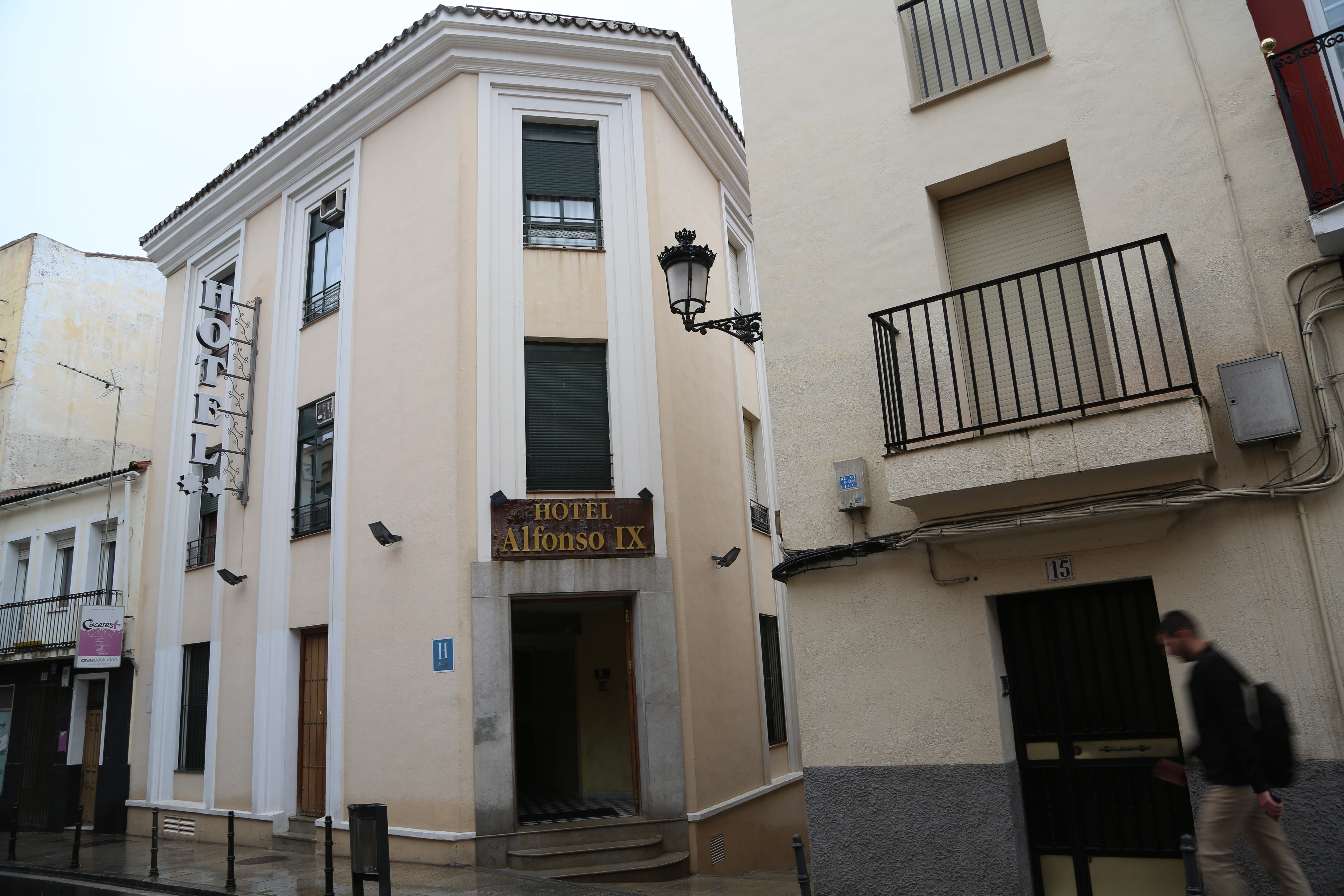 Hotel Alfonso IX, originalmente llamado Hotel Álvarez. Cáceres.